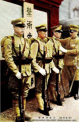 Manchukuo soldiers（满洲国兵士）